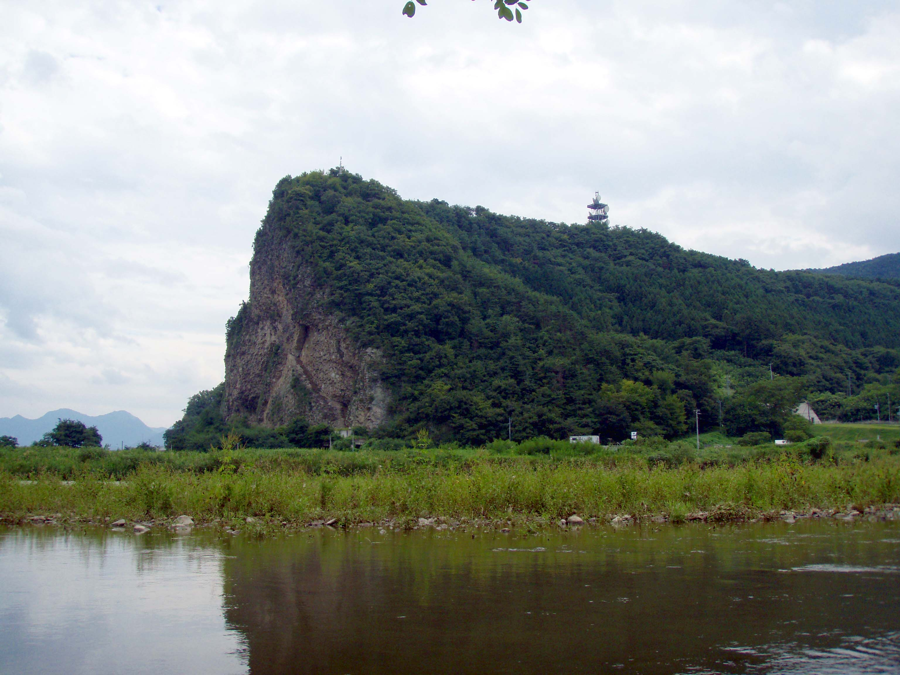 千曲川の対岸河川敷より望む岩鼻